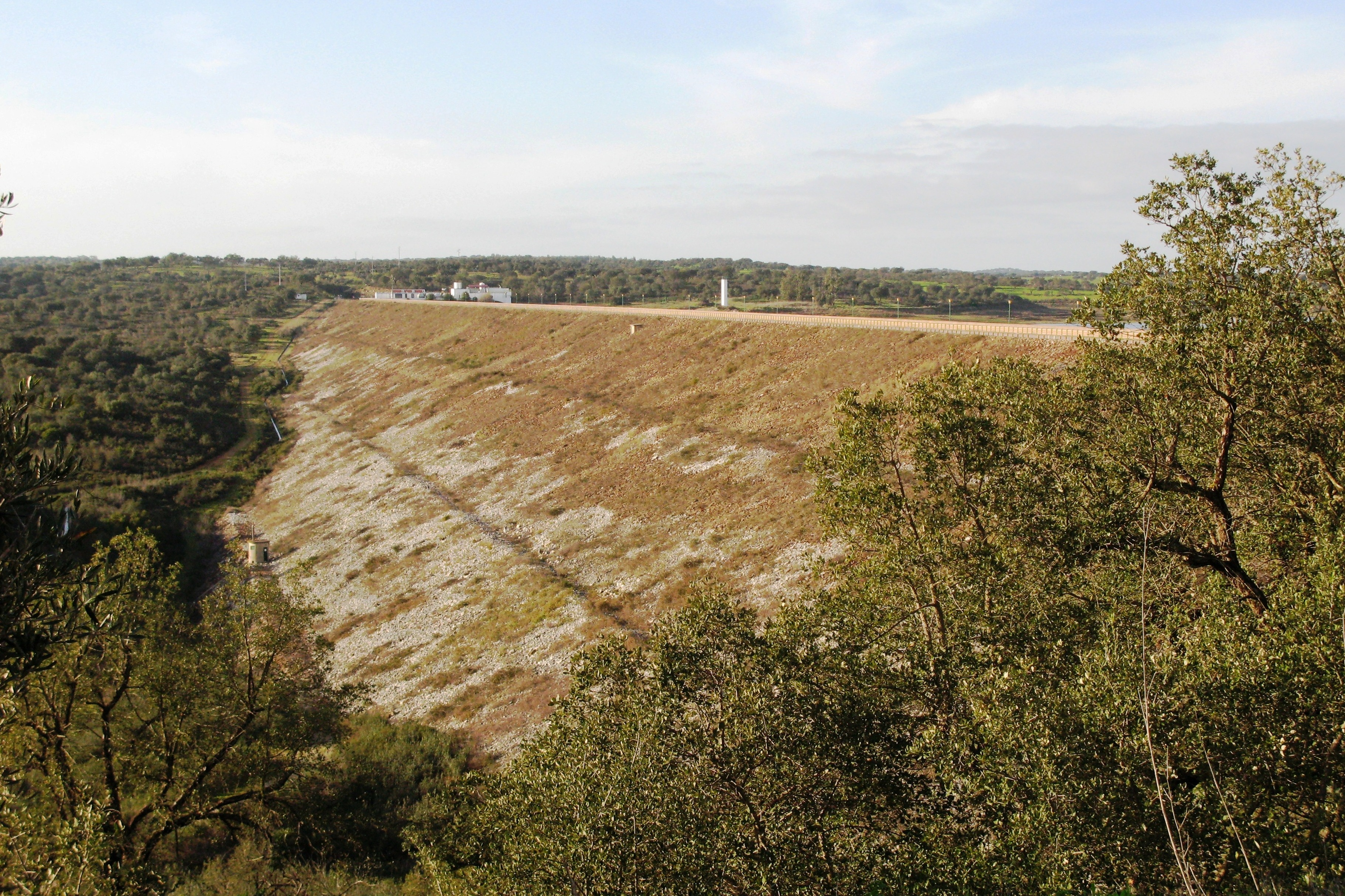 Barrage vun Alvito. Vue op den Damm.